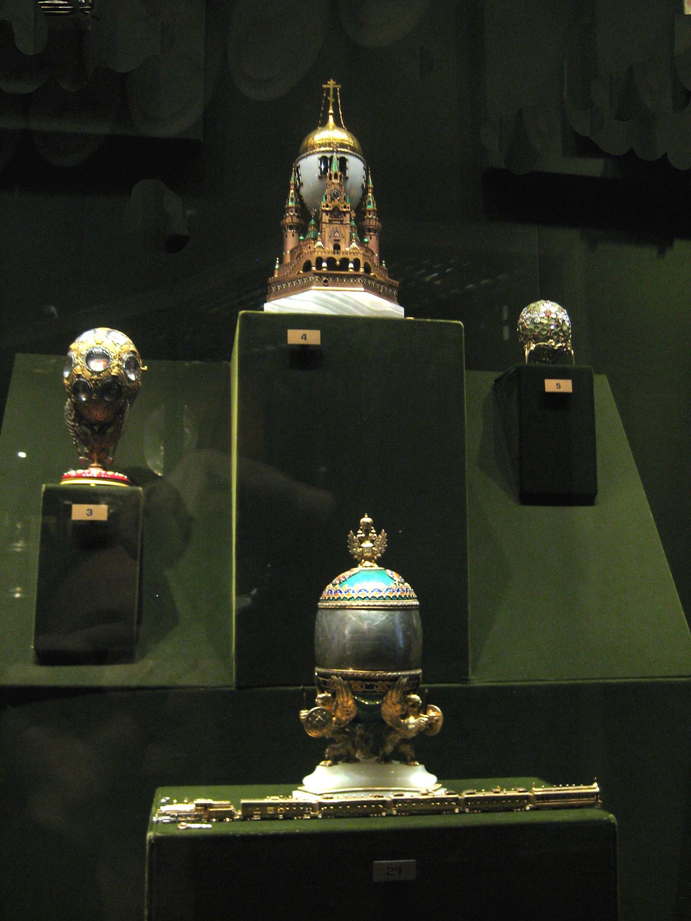 Яйца фаберже в Оружейной палате